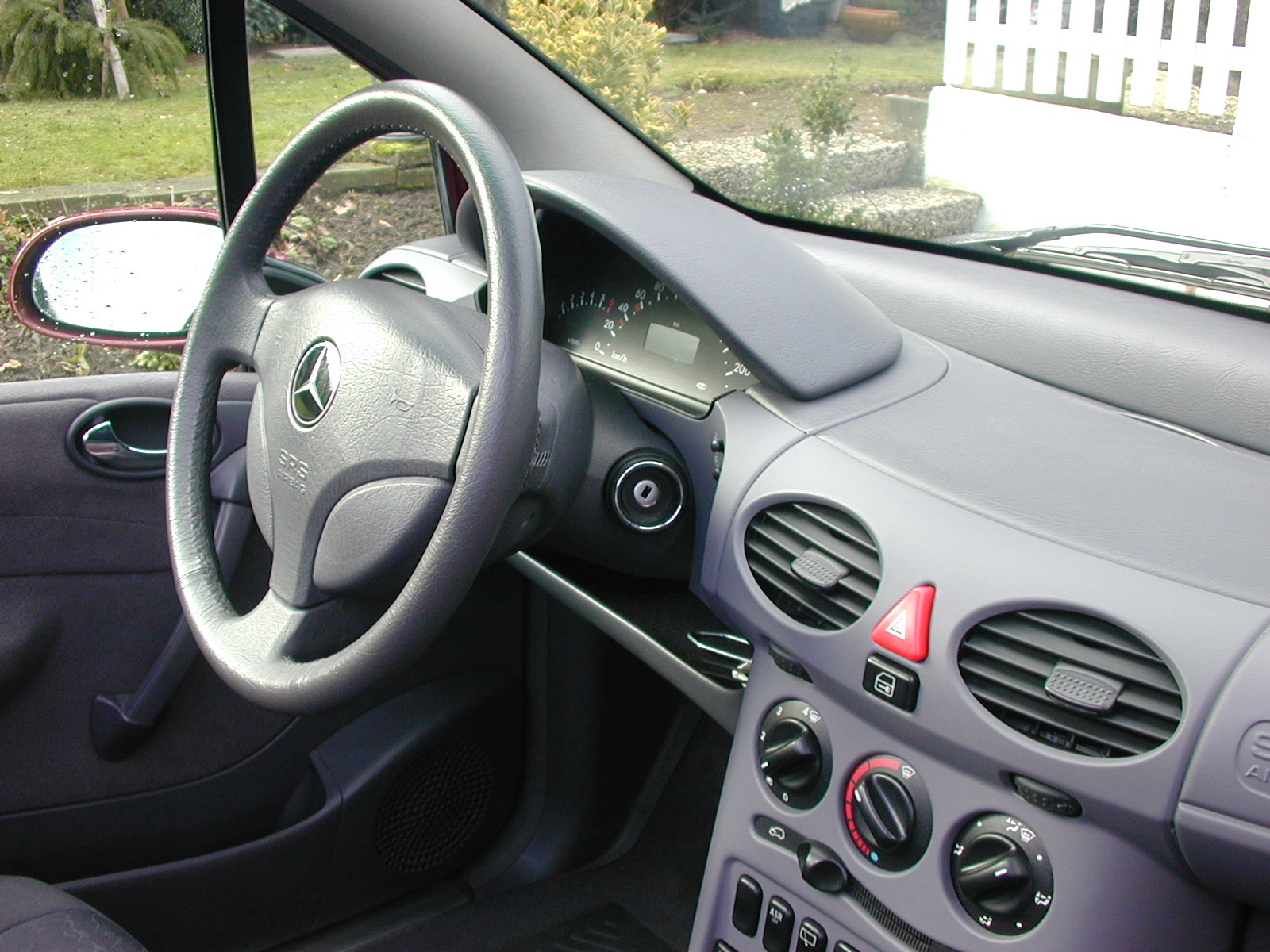 Mercedes W168 A-Class A-Klasse Passenger Cabine Innenraum